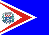 Bandeira da cidade de São João de Iracema, SP